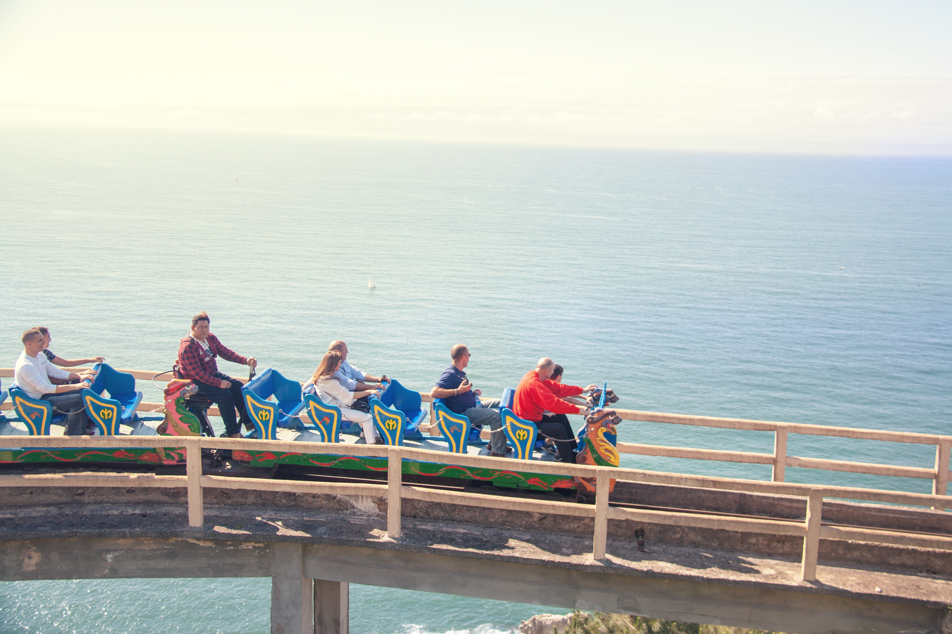 San Sebastián, España